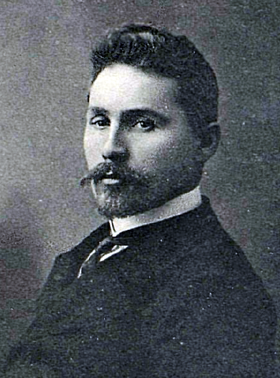 Иван Семёнович Томилов (30 октября 1873, Архангельская губерния — 1918, Онега) — учётчик по волостному правлению, депутат III Государственной думы от Архангельской губернии (1907—1912).